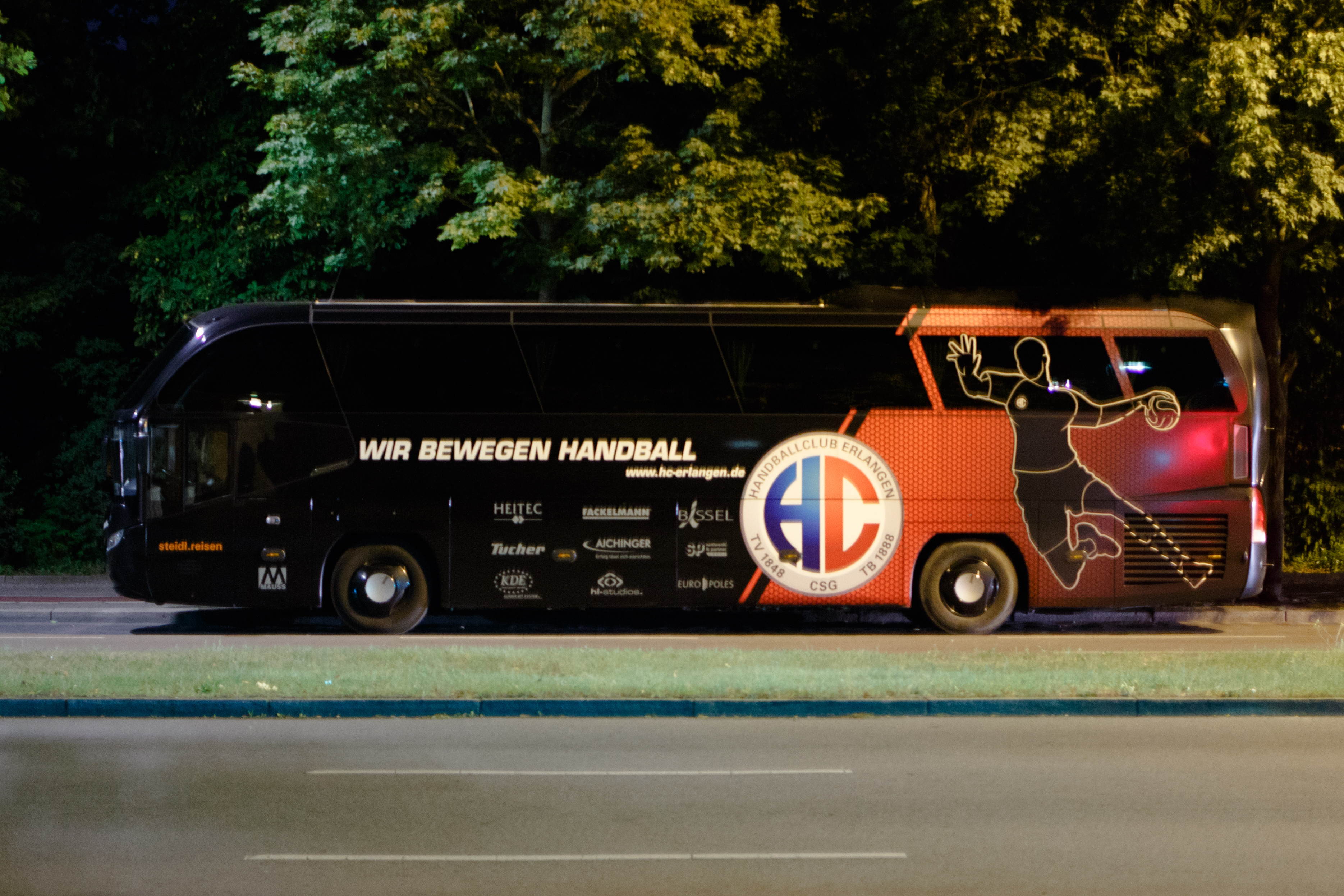 Bus des Handballclubs Erlangen in Berlin